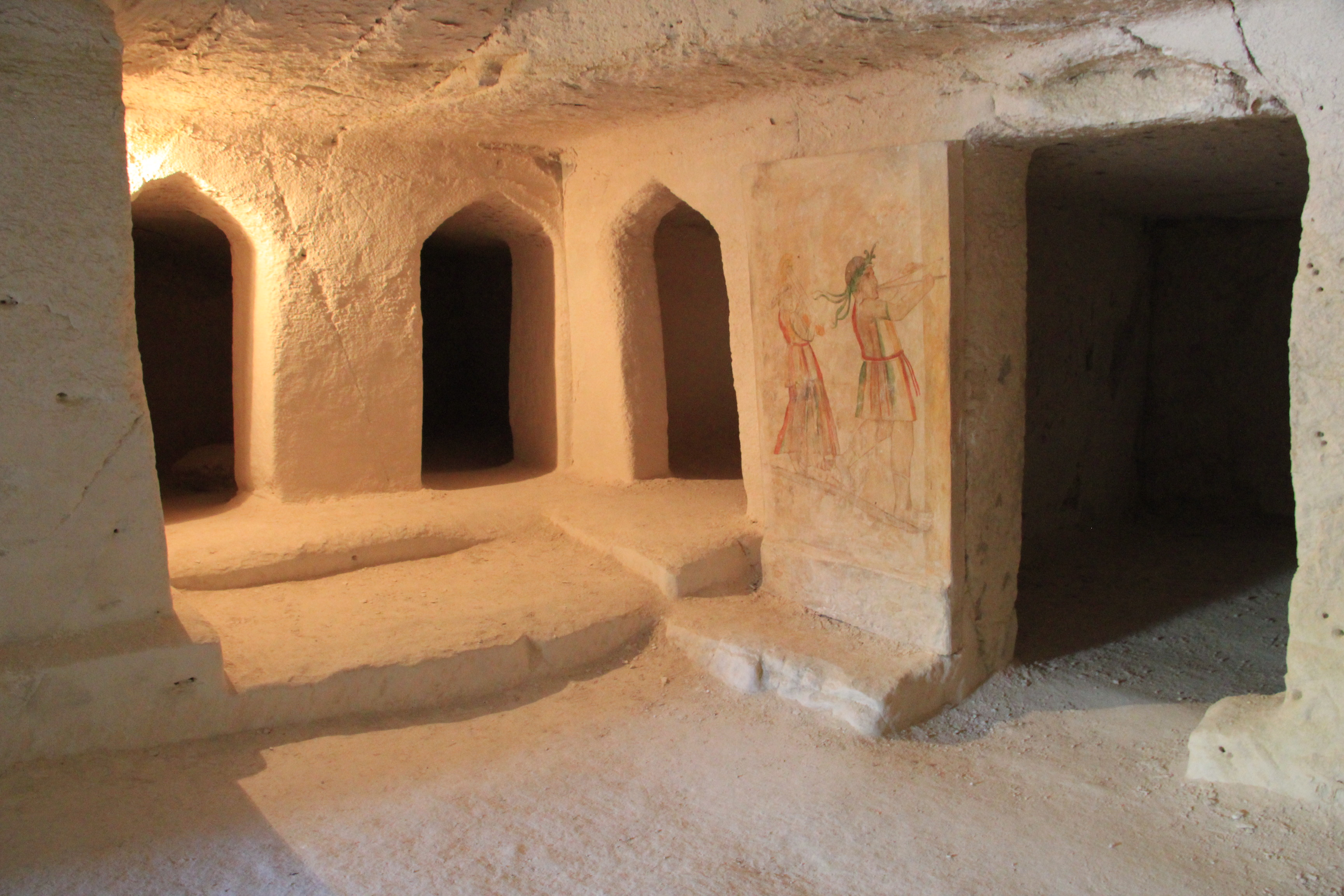 Caves at Beit Govrin